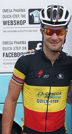 Tom Boonen during Tour de Pologne 2012